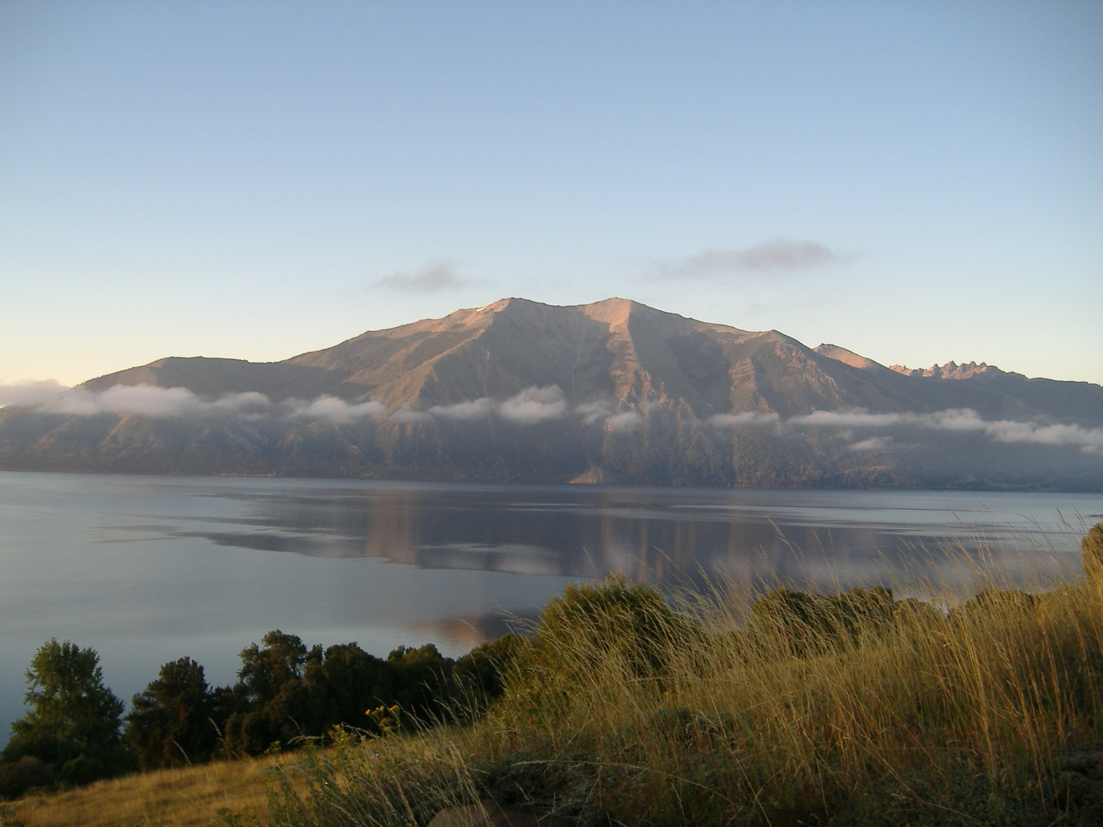 Cerro junto al Lago Huechulaufquen, provincia de Neuquén, Patagonia Argentina